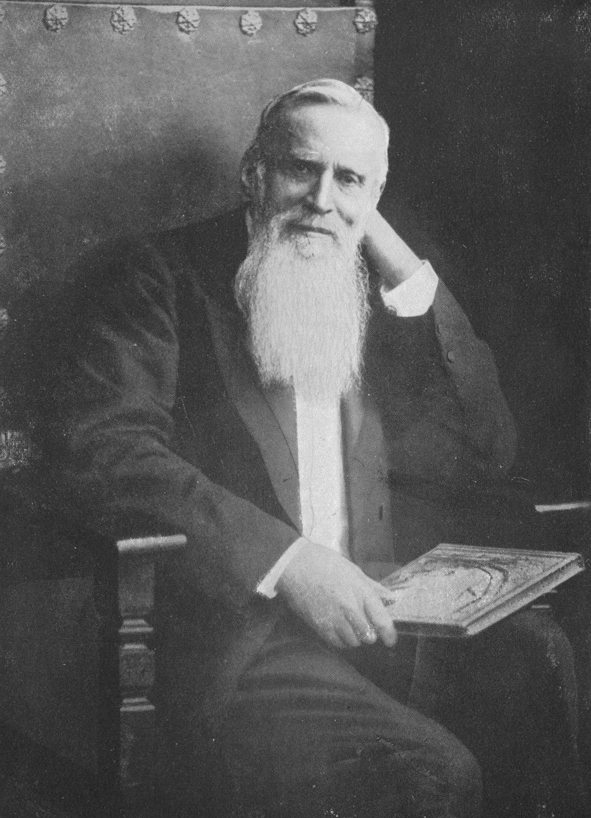 Доктор Фредерик Вильгельм Бедекер (1823-1906) - немецкий миссионер в России